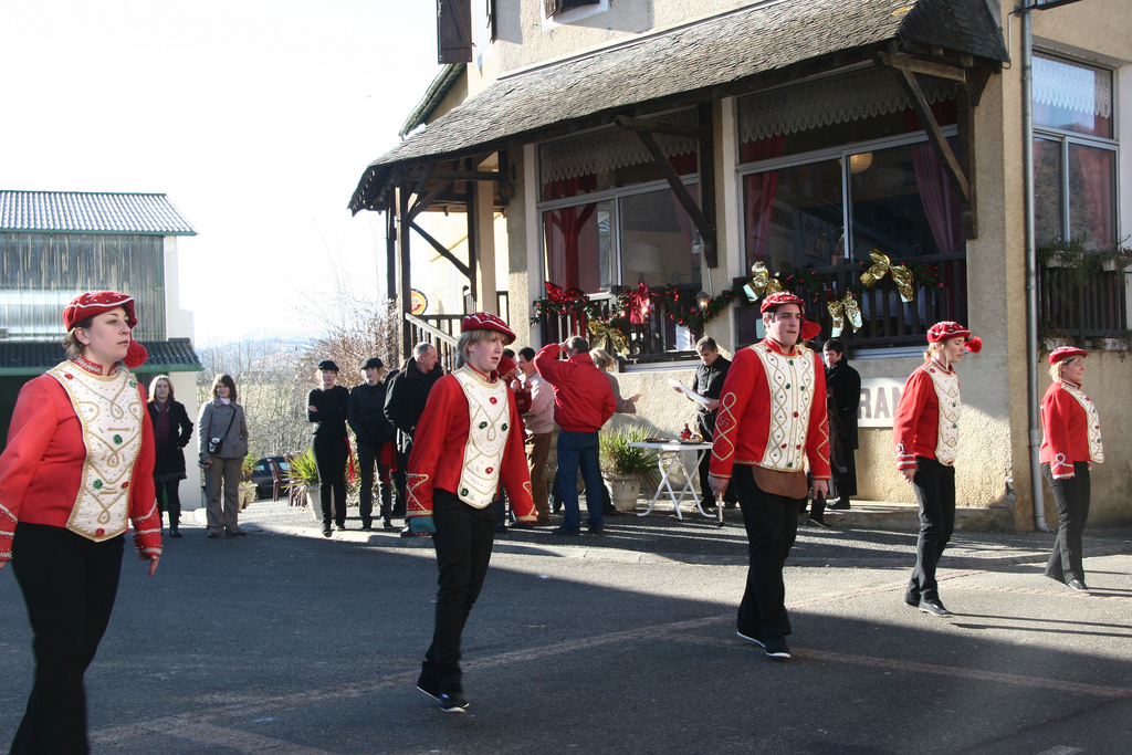 Barkoxeko maskarada Barkoxen. Marexalak. 2009-01-19